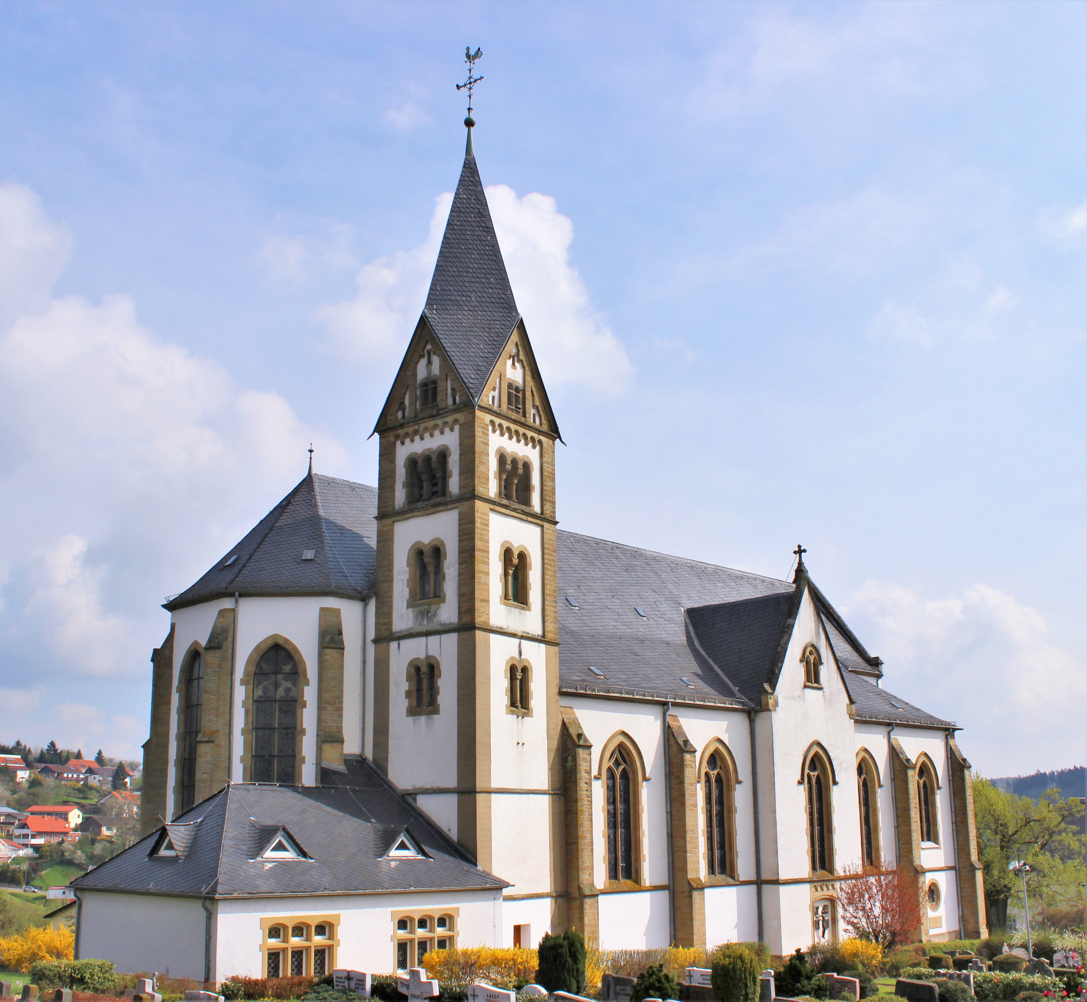 Die katholische Pfarrkirche Mariä Himmelfahrt in Marpingen, Landkreis St. Wendel, Saarland